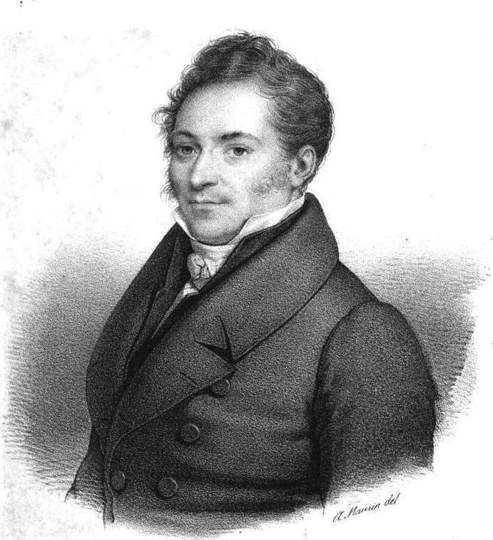 Cabet